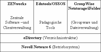 Beschreibung: Schema der Struktur der Linux-Musterlösung